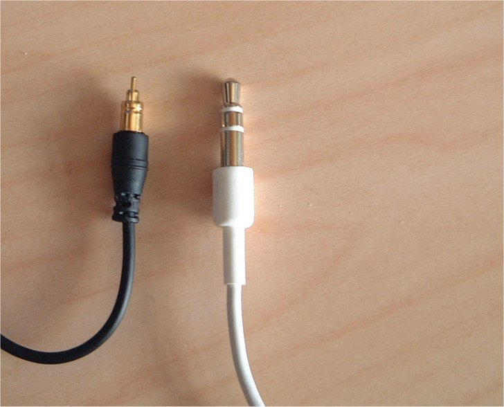 マイクロミニプラグとステレオミニプラグの比較